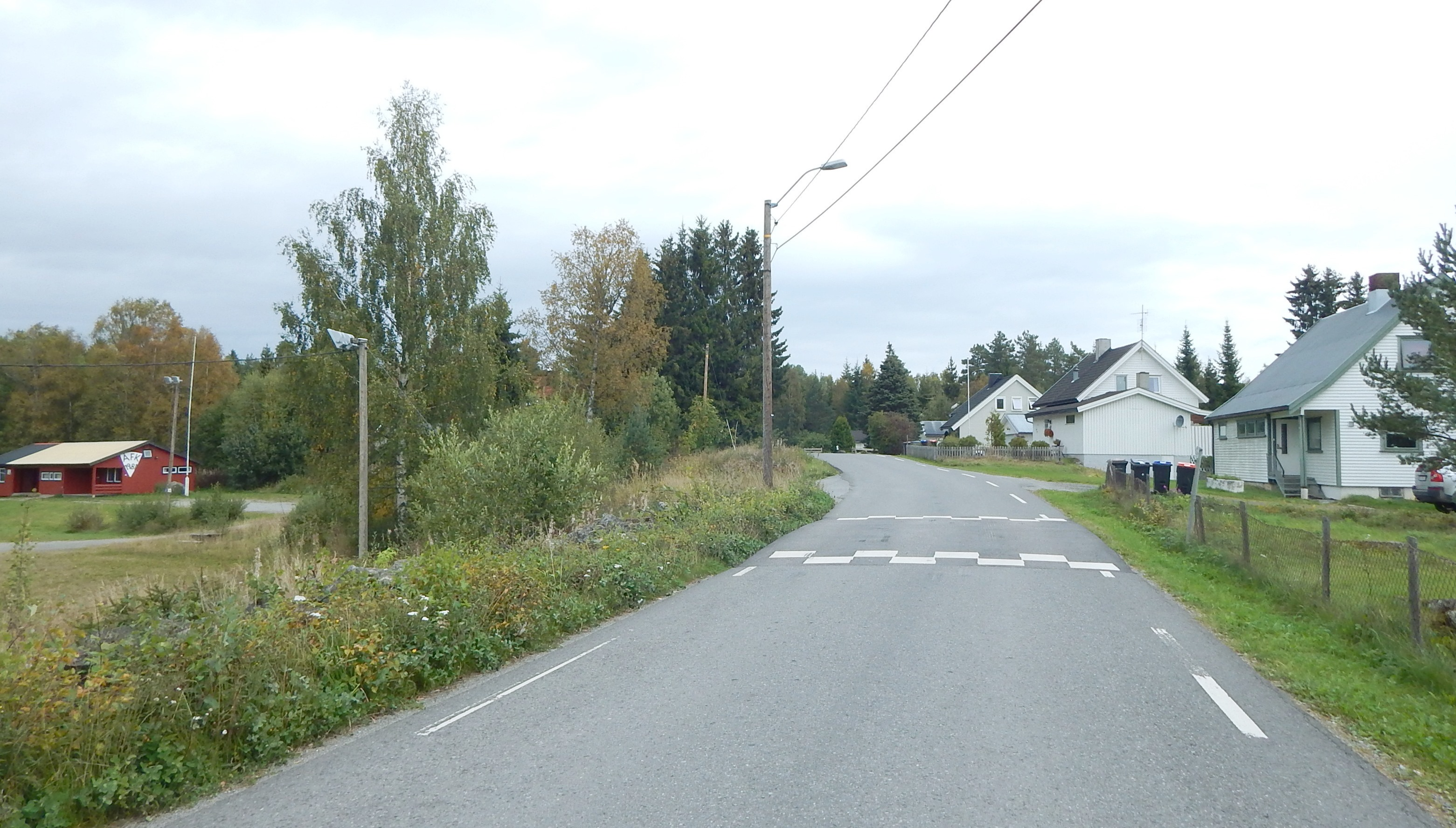 Kjøstadvegen (fylkesvei 1840, tidl. 164) forbi idrettsplassen på Klevbakken (Ådalsbruk)